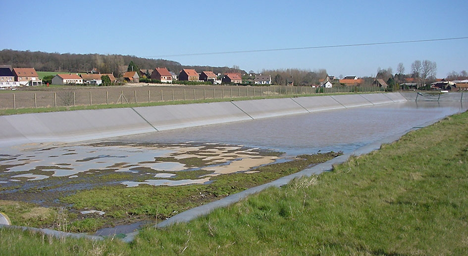 Le jour de l'inondation record (niveau record dépassé de 40 cm), début mars 2002, le bassin de rétention de la nouvelle route de contournement du village d'heuringhem (pas de calais, France) n'a pas reçu une quantité exceptionnelle d'eau de ruissellement. Celui ci est construit dans le bassin versant voisin de la melde, qui se jette dans la Lys. Ceci laisse penser que la pluviométrie a du être exceptionnelle plus en aval, ou que le bassin versant ne bénéficie plus de l'inertie qui freinait autrefois les flux d'eau (grâce aux barrages, aux bandes enherbées, talus et bocage..